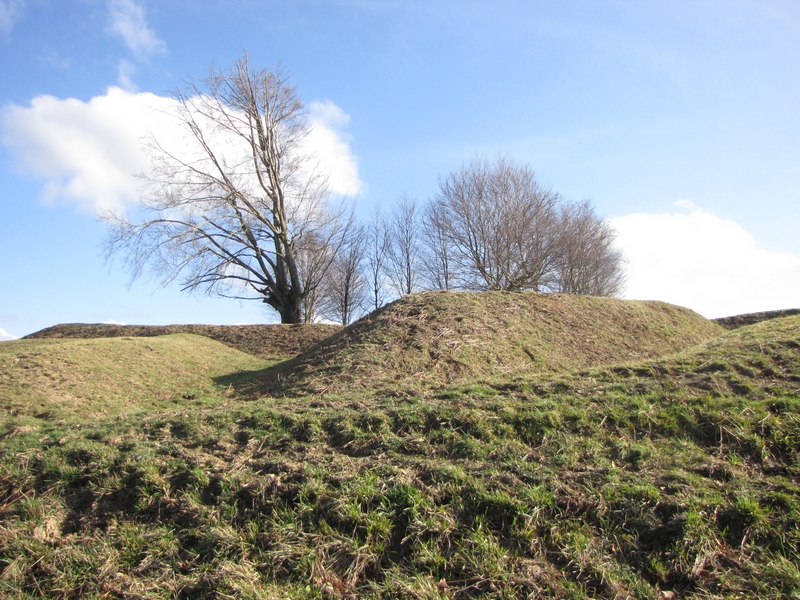 Santa Barbara fortea: gotorlekuko multzoa mendebaldetik. Ezkerraldean, balizko ilargi-erdia.